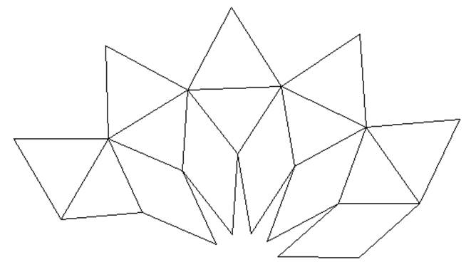 Csúcs test hálója